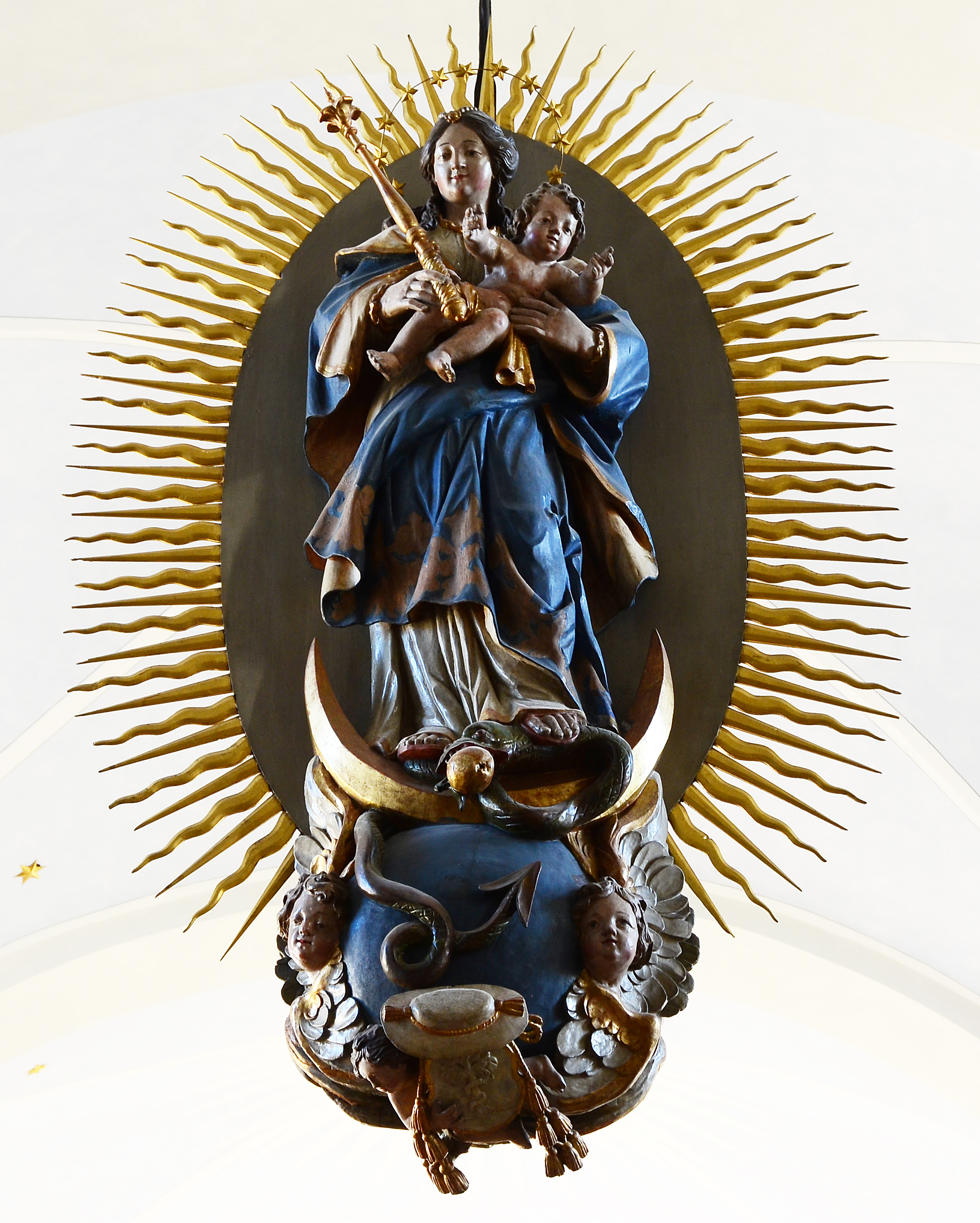 St.Pankratiuskirche, Strahlenkranzmadonna